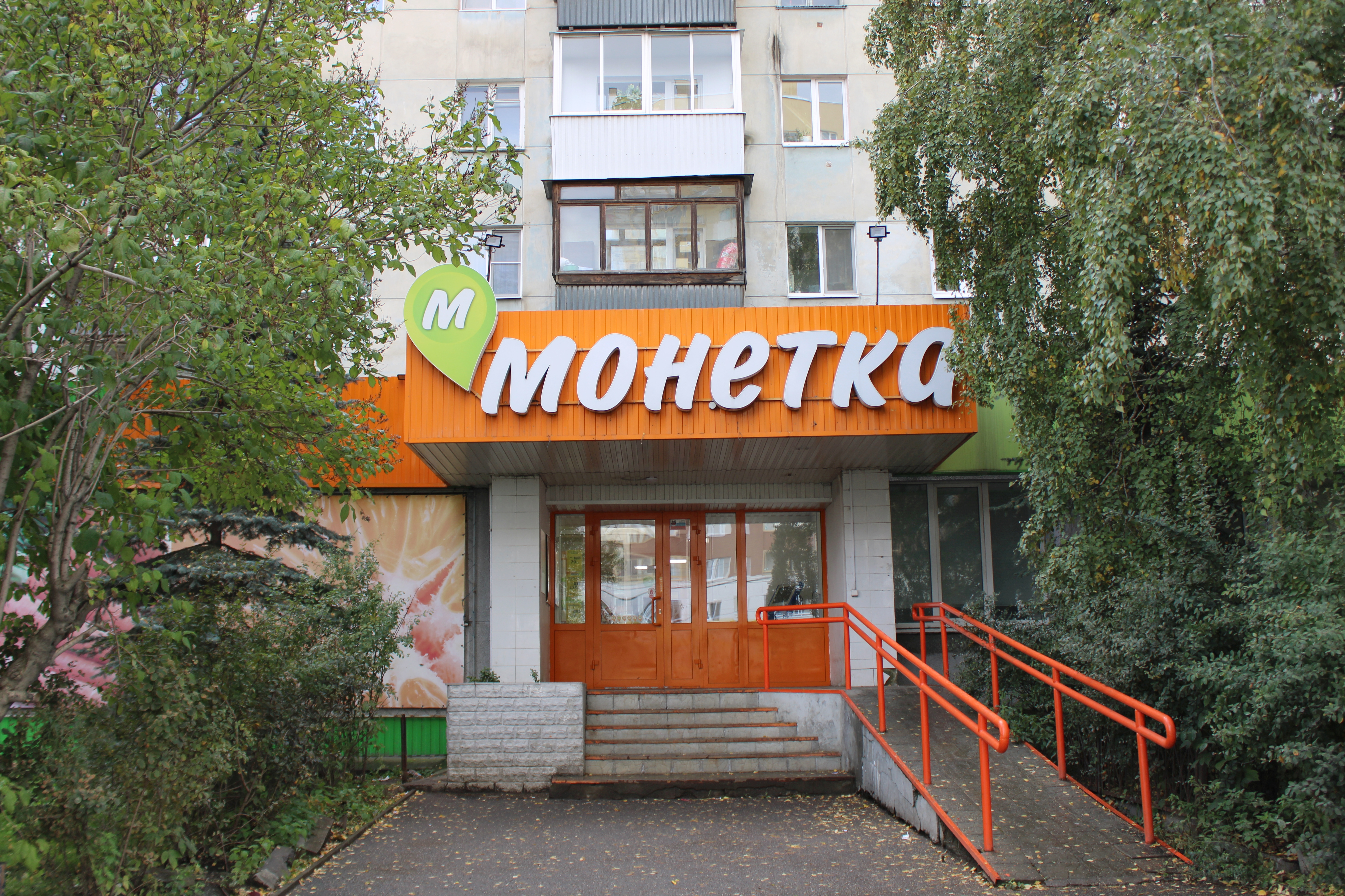 Супермаркет «Монетка» на улице Щербакова, 47 (Екатеринбург)